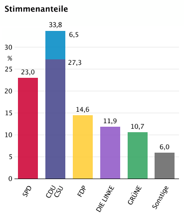 Zweitstimmenergebnis Bundestagswahl am 27. September 2009